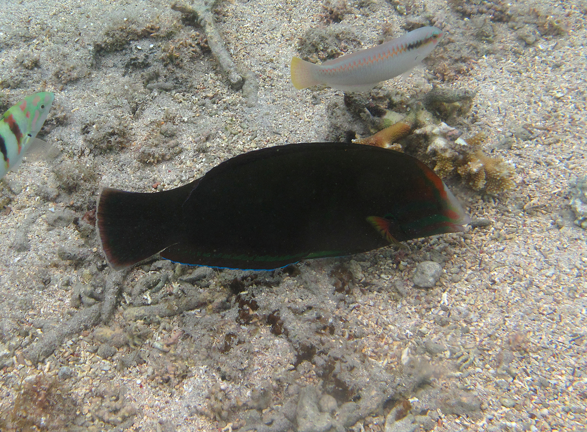 Une girelle africaine (Coris cuvieri) à la Réunion.